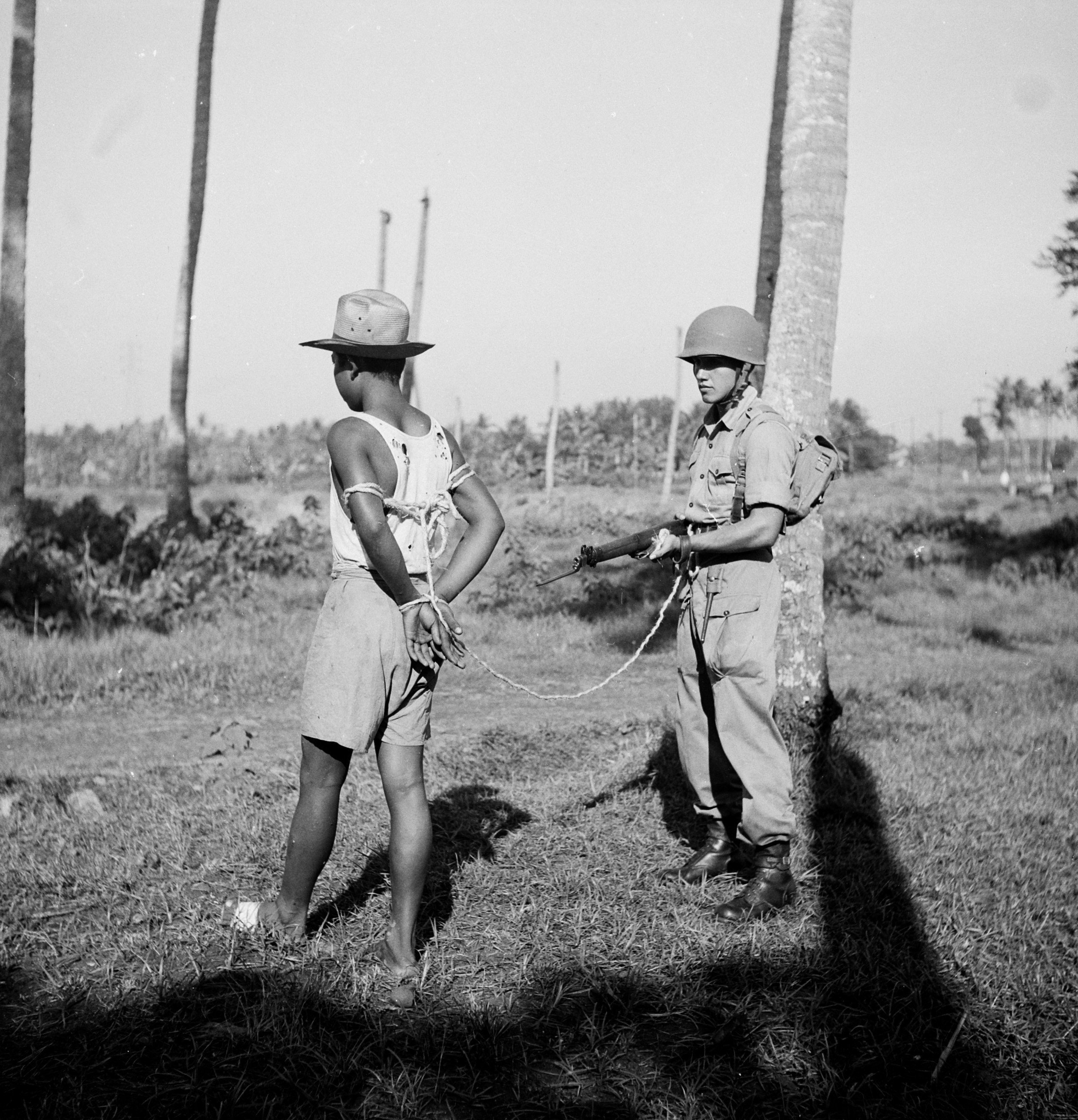 Collectie / Archief : Fotocollectie Dienst voor Legercontacten Indonesië Reportage / Serie : [DLC] V.P.T.L. Beschrijving : [een arrestant wordt afgevoerd. Hij is geboeid met de z.g. Atjeh-knoop en zit vast aan de koppelriem van de soldaat] Annotatie : V.P.T.L. = Voorschrift voor de uitoefening van de Politiek-Politionele Taak van het Leger (optreden tegen guerillastrijders). Dit voorschrift van het KNIL dateert al uit 1928, verscheen in 1936 en is gewijzigd en aangevuld in 1945 en in 1946 nog een keer uitgegeven, nu speciaal voor de KL. De fotoserie werd gebruikt voor de brochure "Kennis van het V.P.T.L., een kwestie van leven of dood / Mengetahoei akan V.P.T.L., soal hidoep atau mati" [DjK] Datum : 1946 Locatie : Indonesië, Nederlands-Indië Fotograaf : Fotograaf Onbekend / DLC Auteursrechthebbende : Nationaal Archief Materiaalsoort : Negatief (zwart/wit) Nummer archiefinventaris : bekijk toegang 2.24.04.03 Bestanddeelnummer : 15839